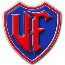 las siglas de la barra ultra fiel de honduras